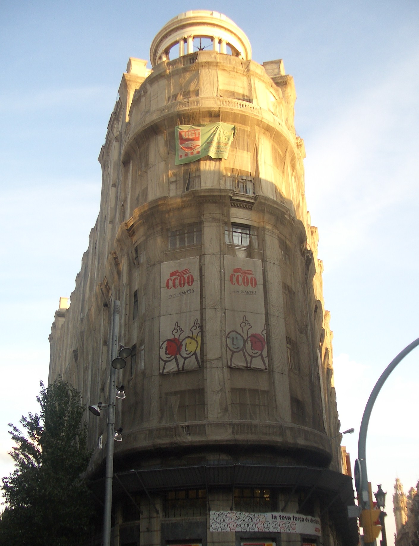 Edificio Via Laietana